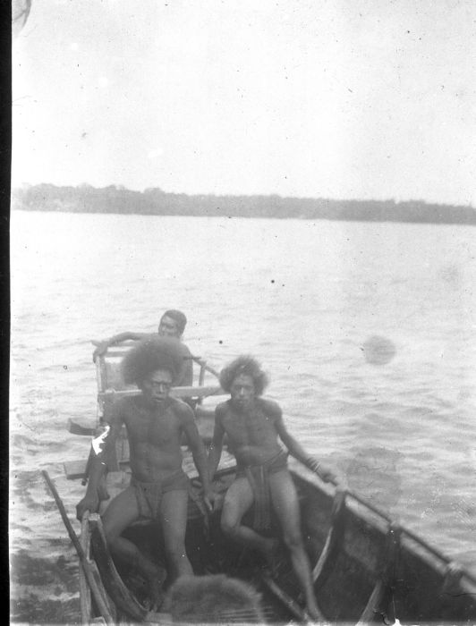 Foto. Drie mannen uit Poelo Babar met de prauw op weg naar de Tanimbar eilanden in de Molukken